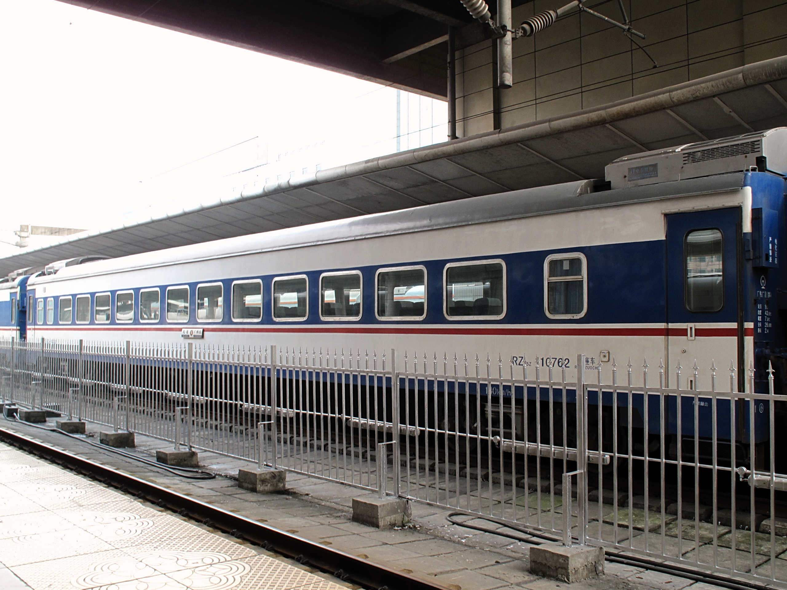 担当广九直通车的四方厂制RZ25Z型（第二批）客车停在广州东站口岸隔离区内